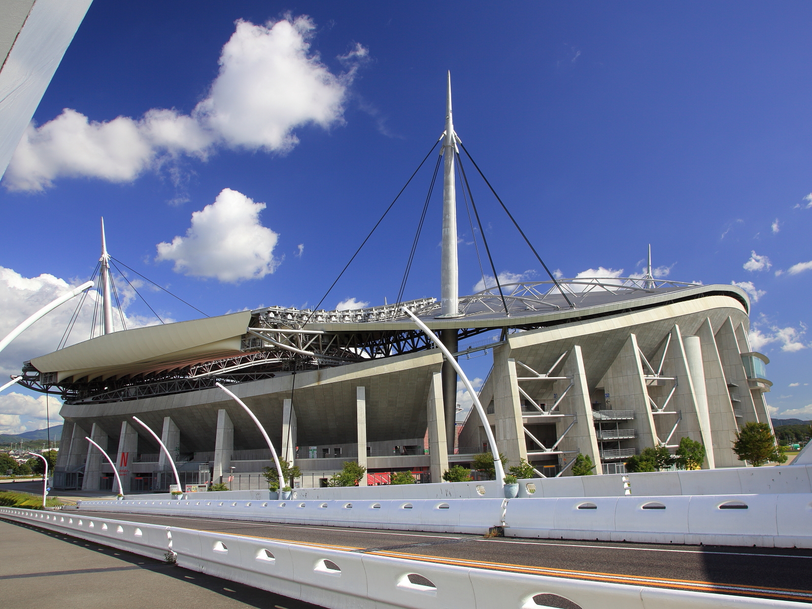 豊田大橋から望む豊田スタジアム（豊田市白浜町、2011年）